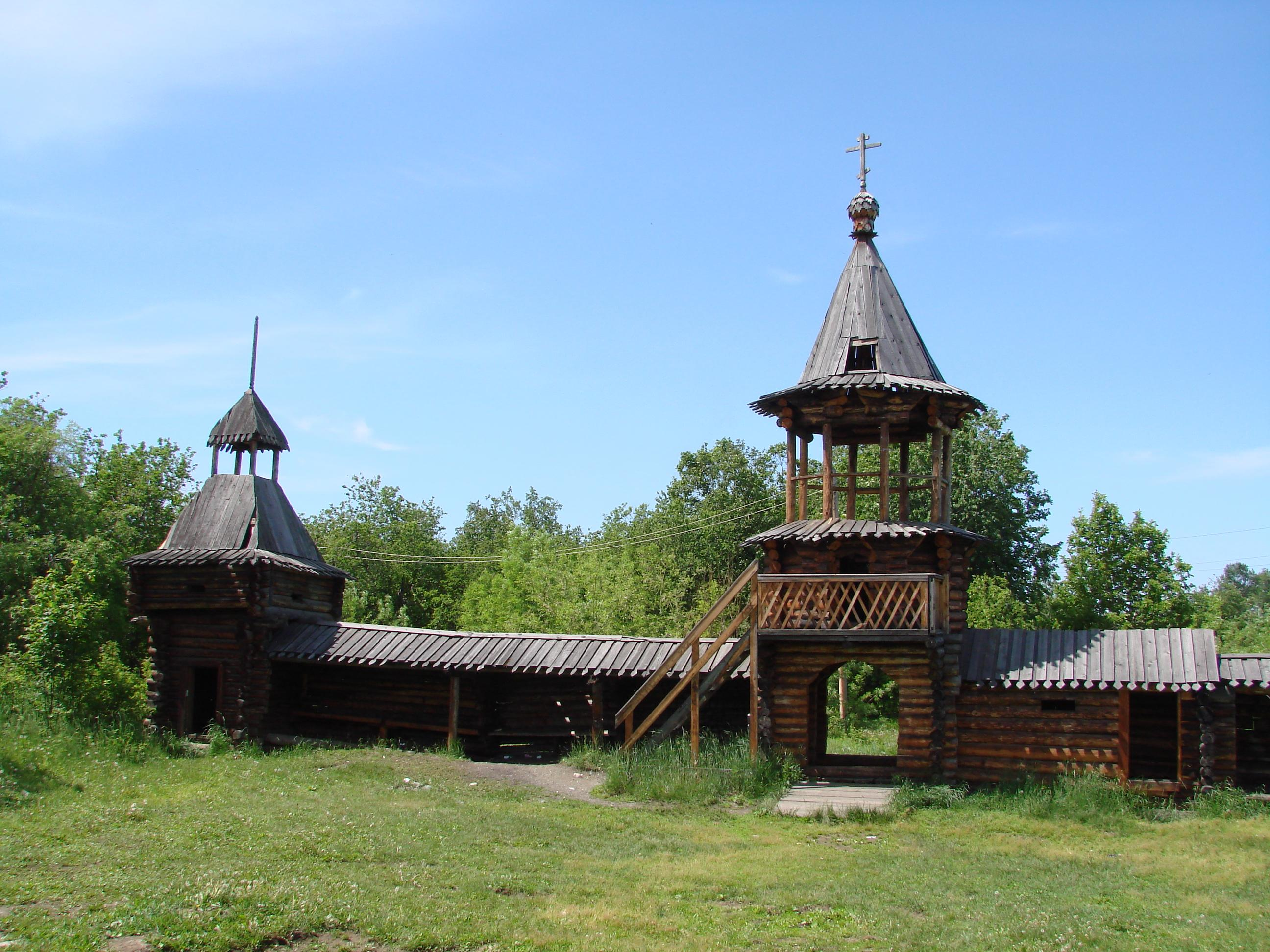 Мильково острог